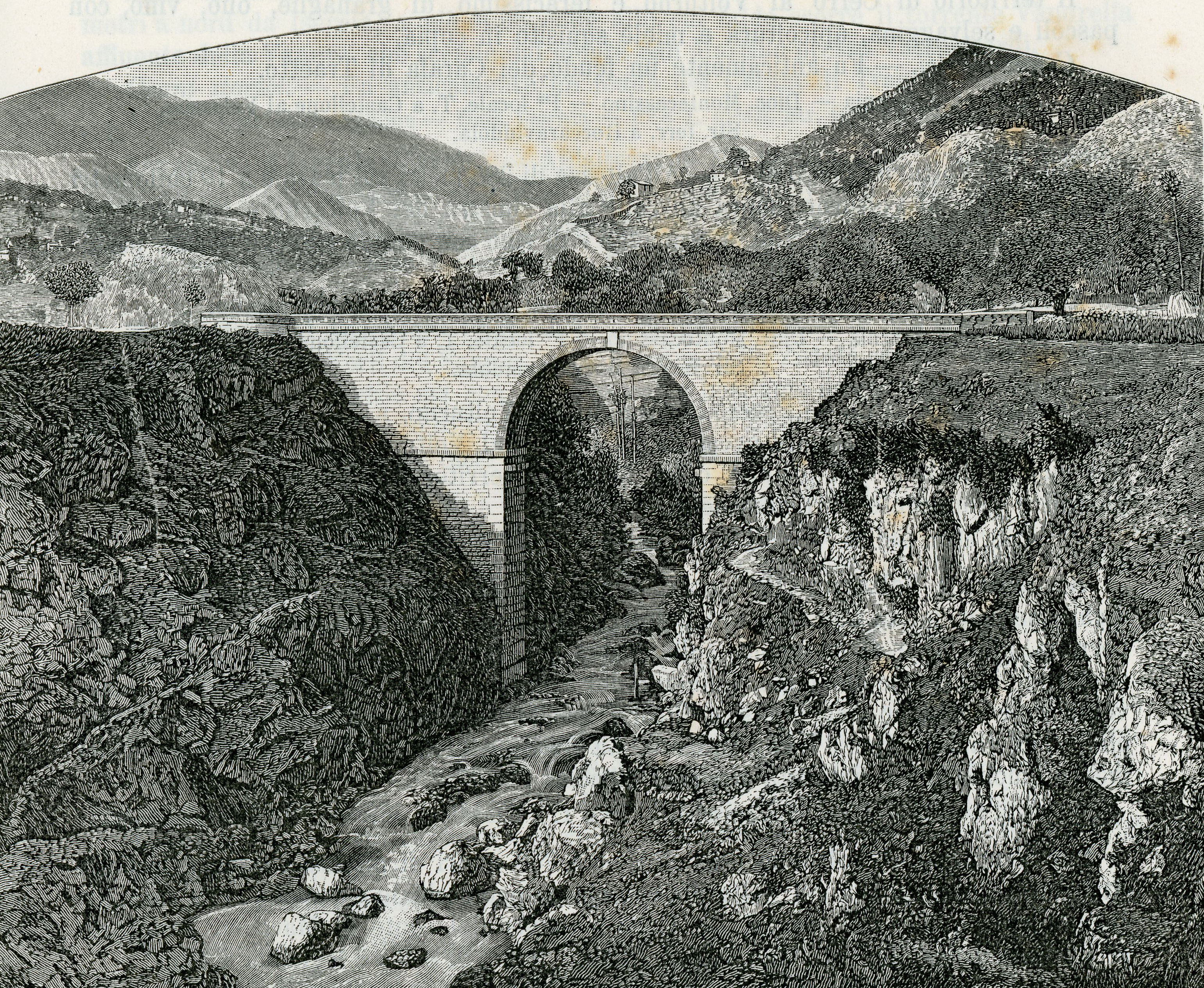 Cerro al Volturno: ponte sul fiume Volturno (xilografia di Barberis 1898).